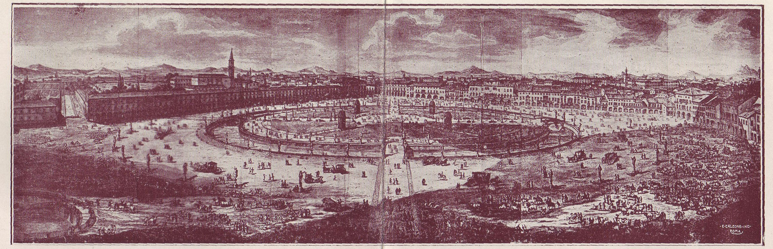 Incisione di Francesco Piranesi faffigurante l'intero progetto di Andrea Memmo su Prato della Valle (Padova)